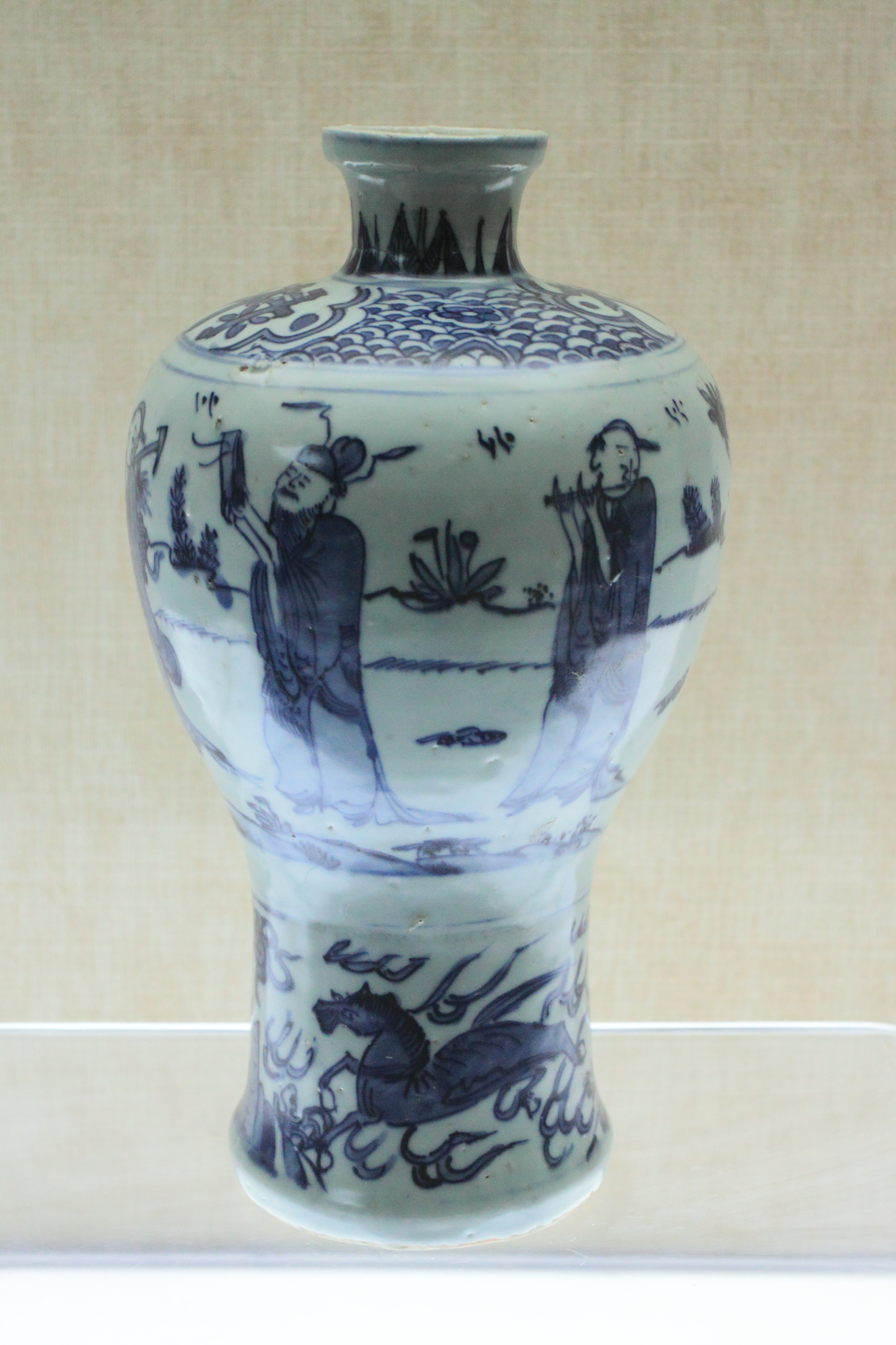 桂林博物馆藏品——梅瓶